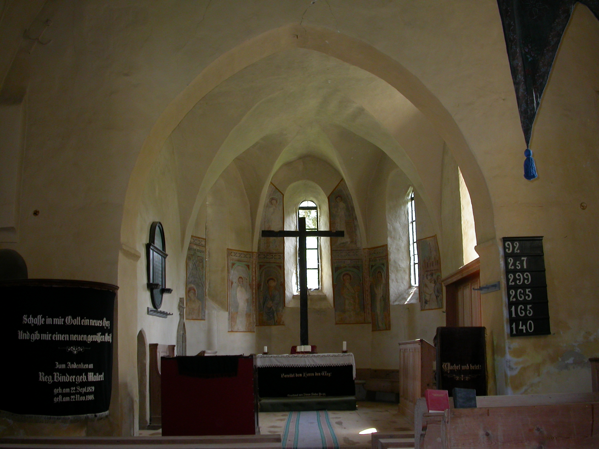 Ansamblul bisericii evanghelice fortificate, sf. sec. XIV- sec. XIX